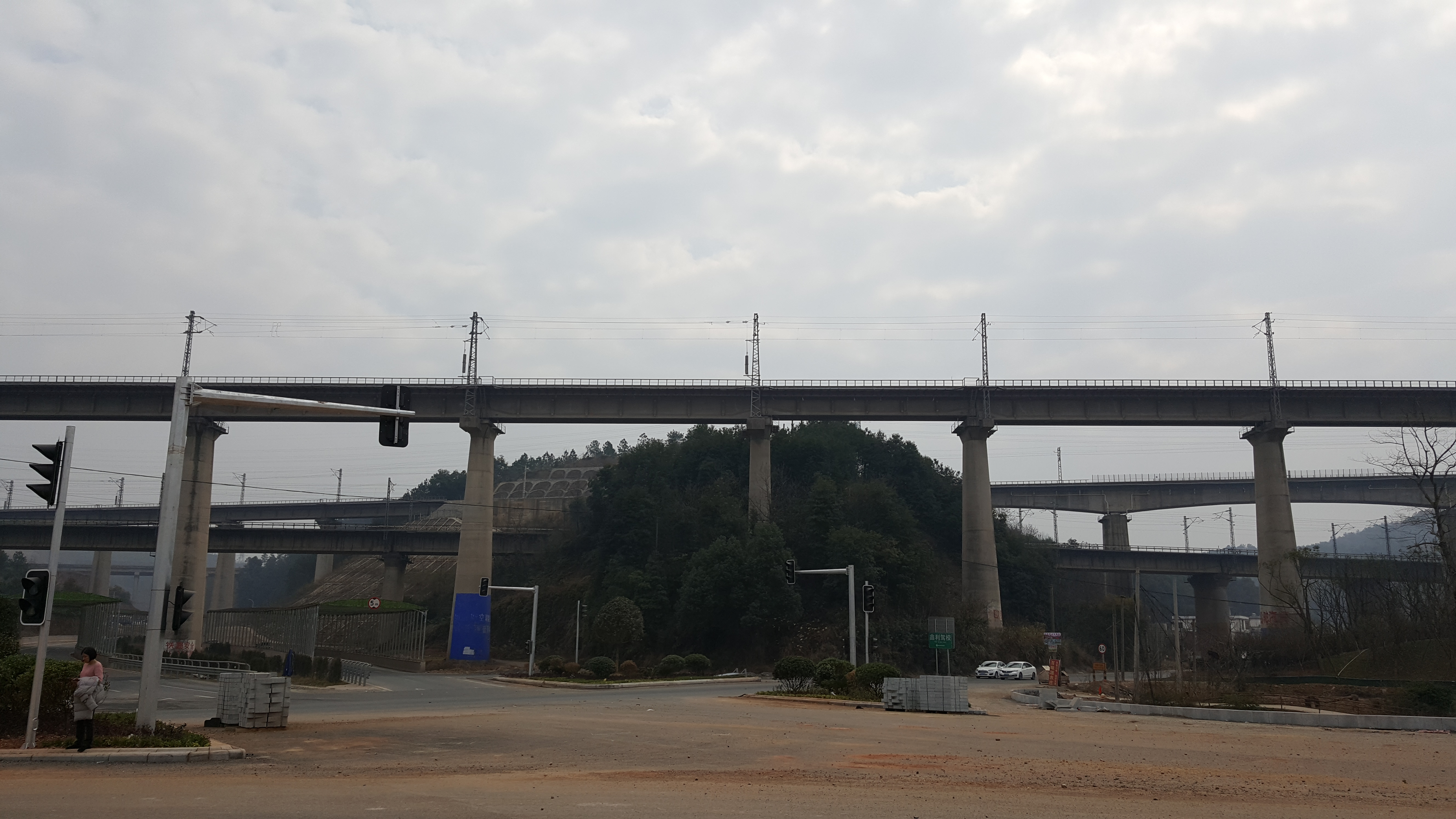 中文（中国大陆）: 赣韶铁路与京九铁路